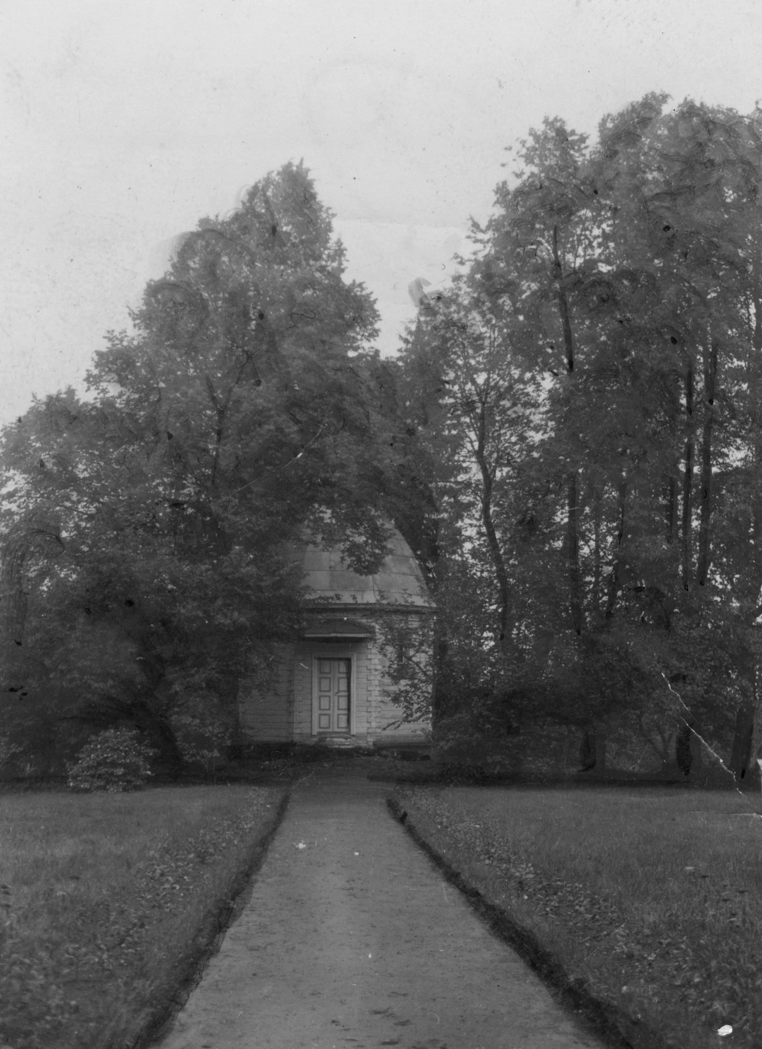 Беларуская (тарашкевіца): Гнязьдзілава (Hniaździłava). Капліца Езуса Міласэрнага